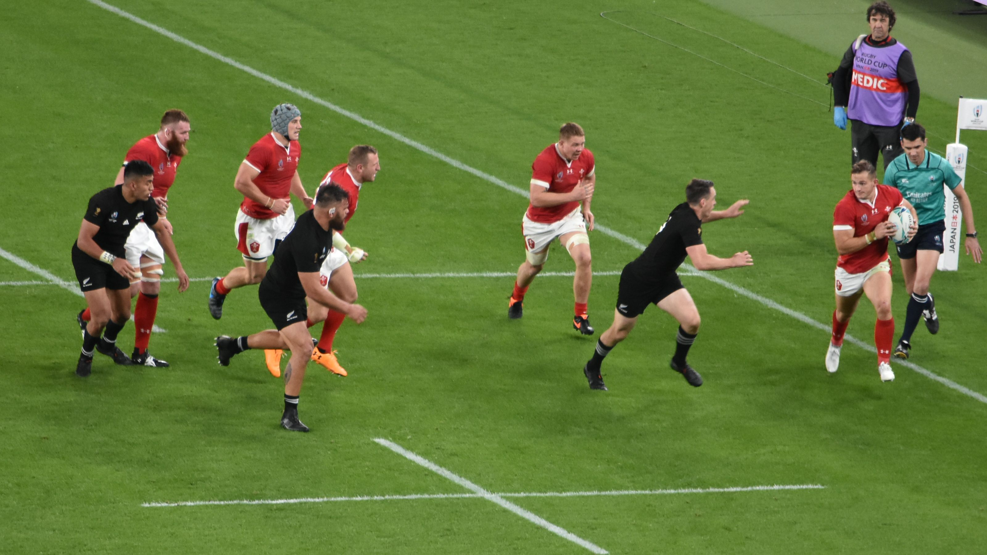 ラグビーニュージーランド代表